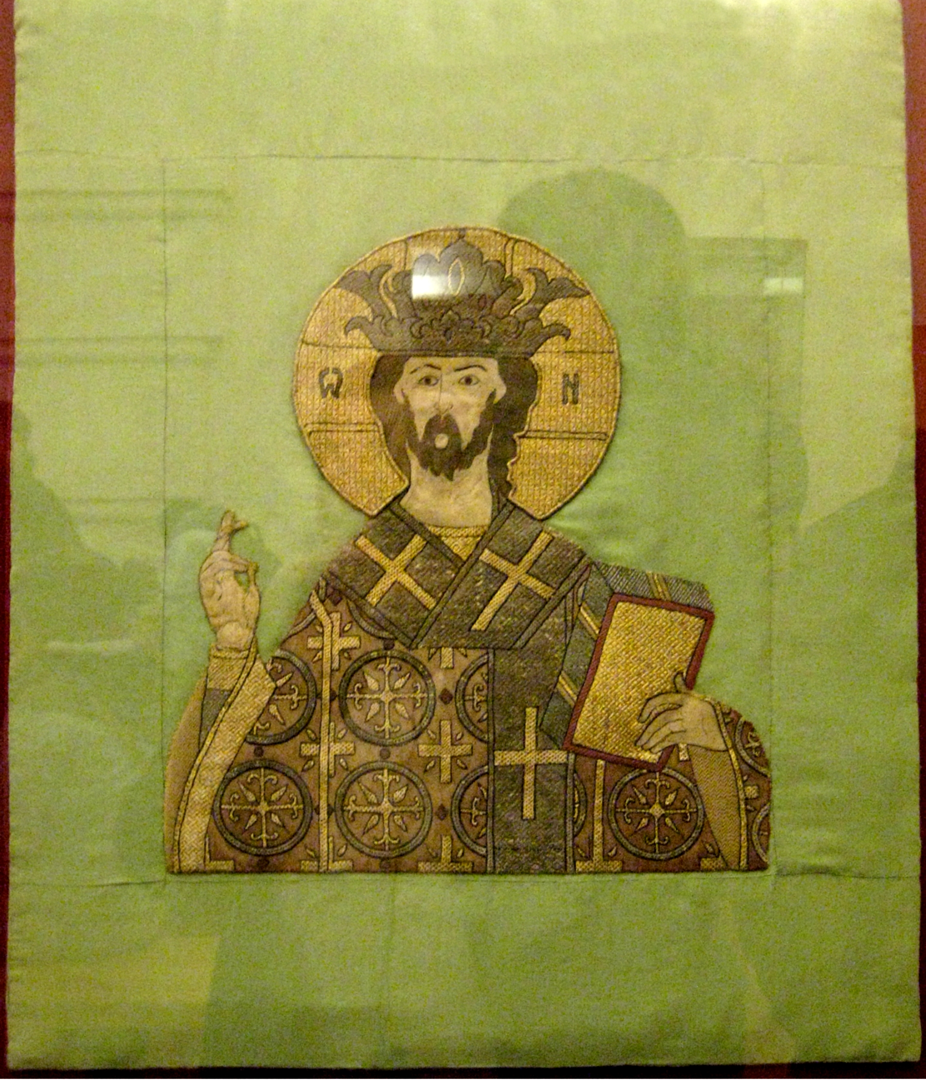 Пелена "Спас Великий Архиерей", 1565 год. Мастерская княгини Ефросиньи Старицкой. Вклад княгини в Кирилло-Белозерский монастырь. Реставриовано в ВХНРЦ им. Грабаря О.Г. Волынцевой-Шуриной, 1984 год